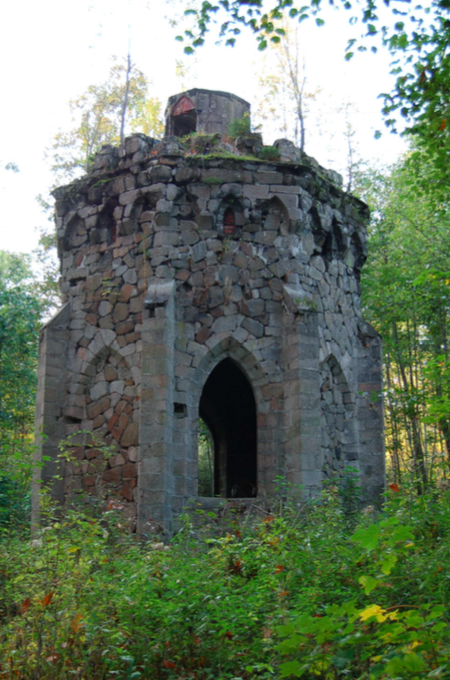 Původní stav